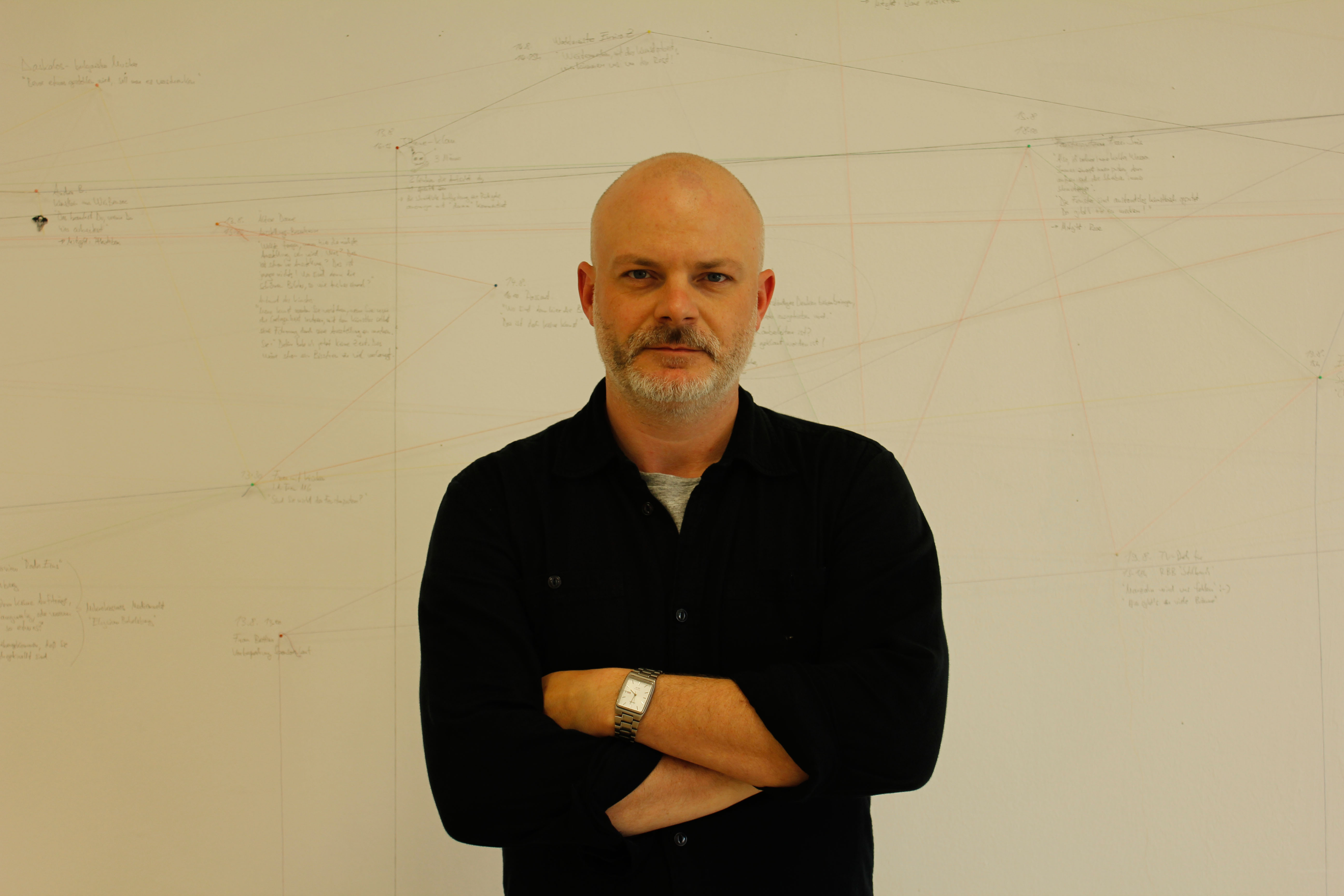 Portrait Foto von Maurice de Martin